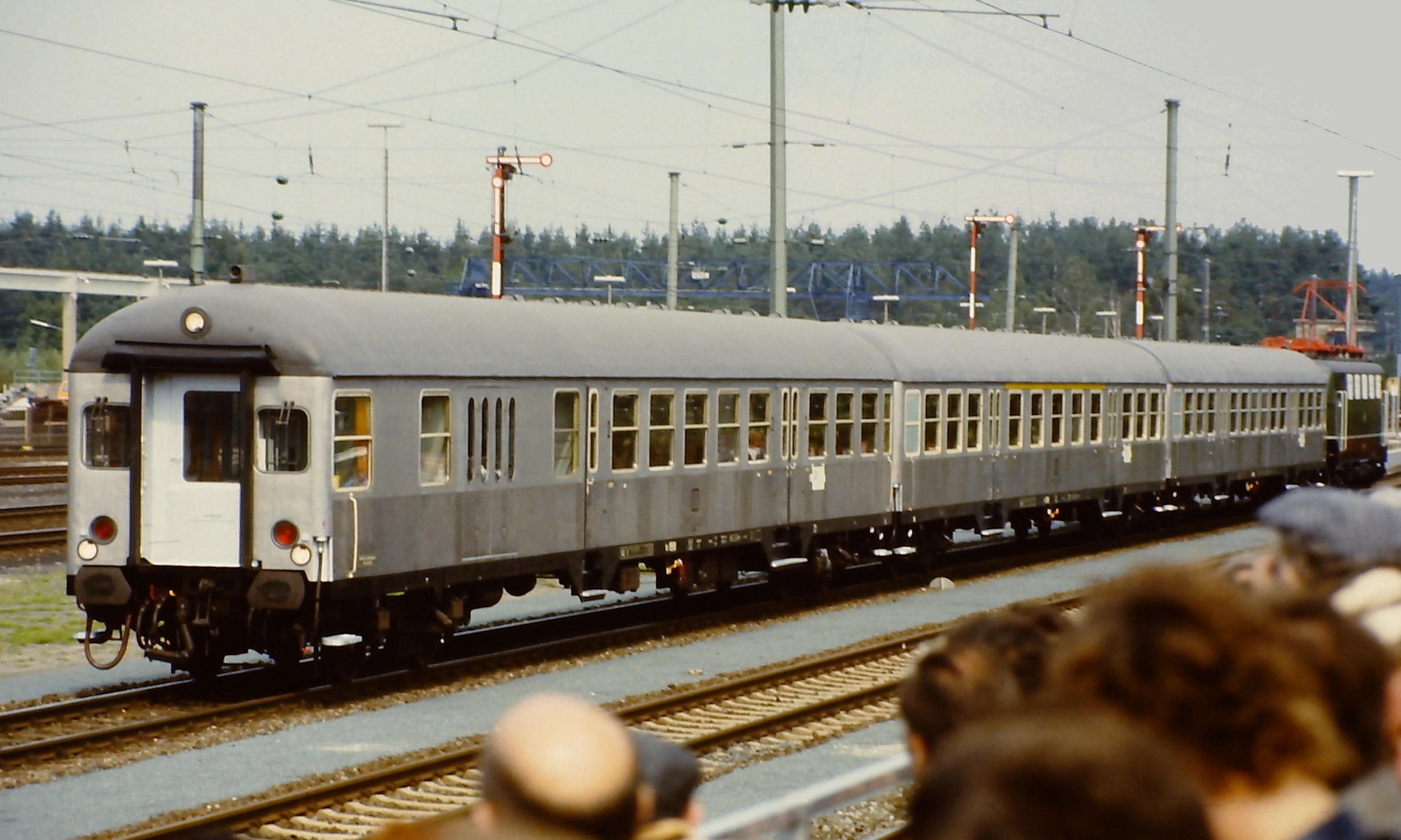 Wendezug mit Silberlingen und 141 072 auf der Jubiläumsparade 150 Jahre deutsche Eisenbahn in Nürnberg